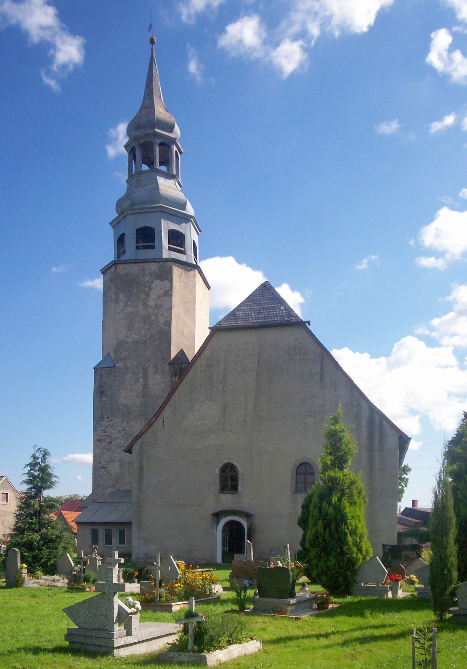 Gierczyn, kościół pw. Narodzenia Najświętszej Marii Panny.